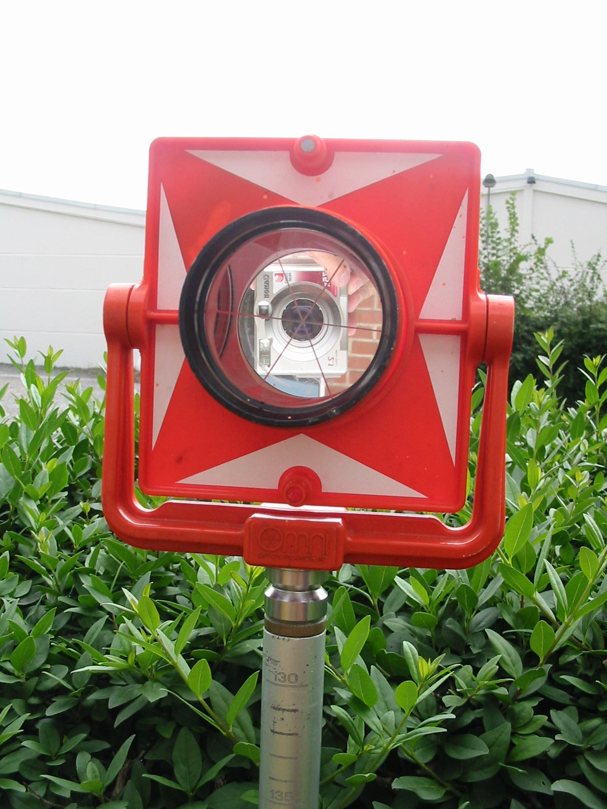 Prisme réfleteur pour Tachéomètre. (vous remarquerez le reflet de l'objectif de l'appareil photo dans le prisme) Auteur: PhY